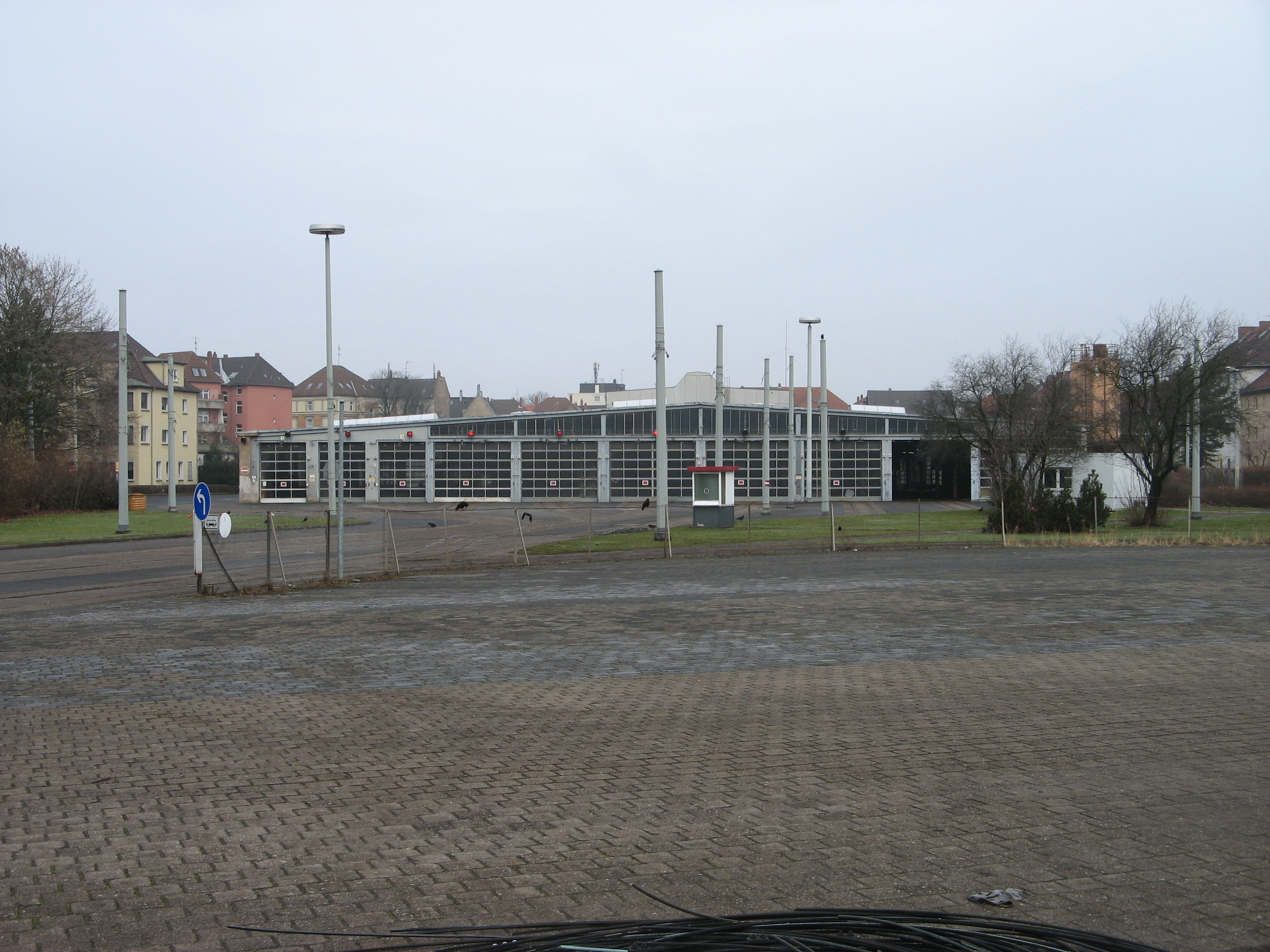 Braunschweig: das alte, bereits verlassene Straßenbahndepot Georg-Westermann-Allee. Auf diesem Areal entstand später das Wohnquartier St. Leonhards Garten.